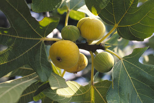 kişisel resim